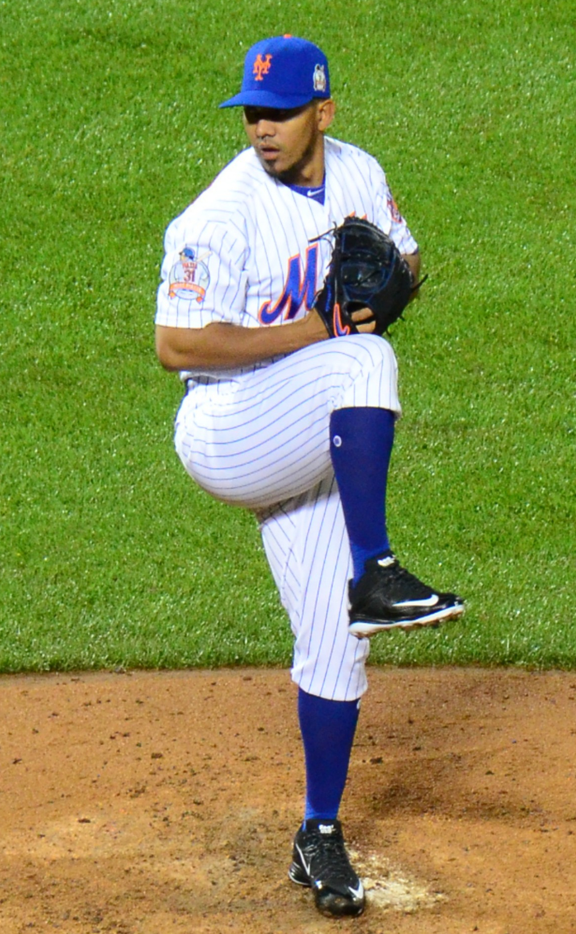 Antonio Bastardo